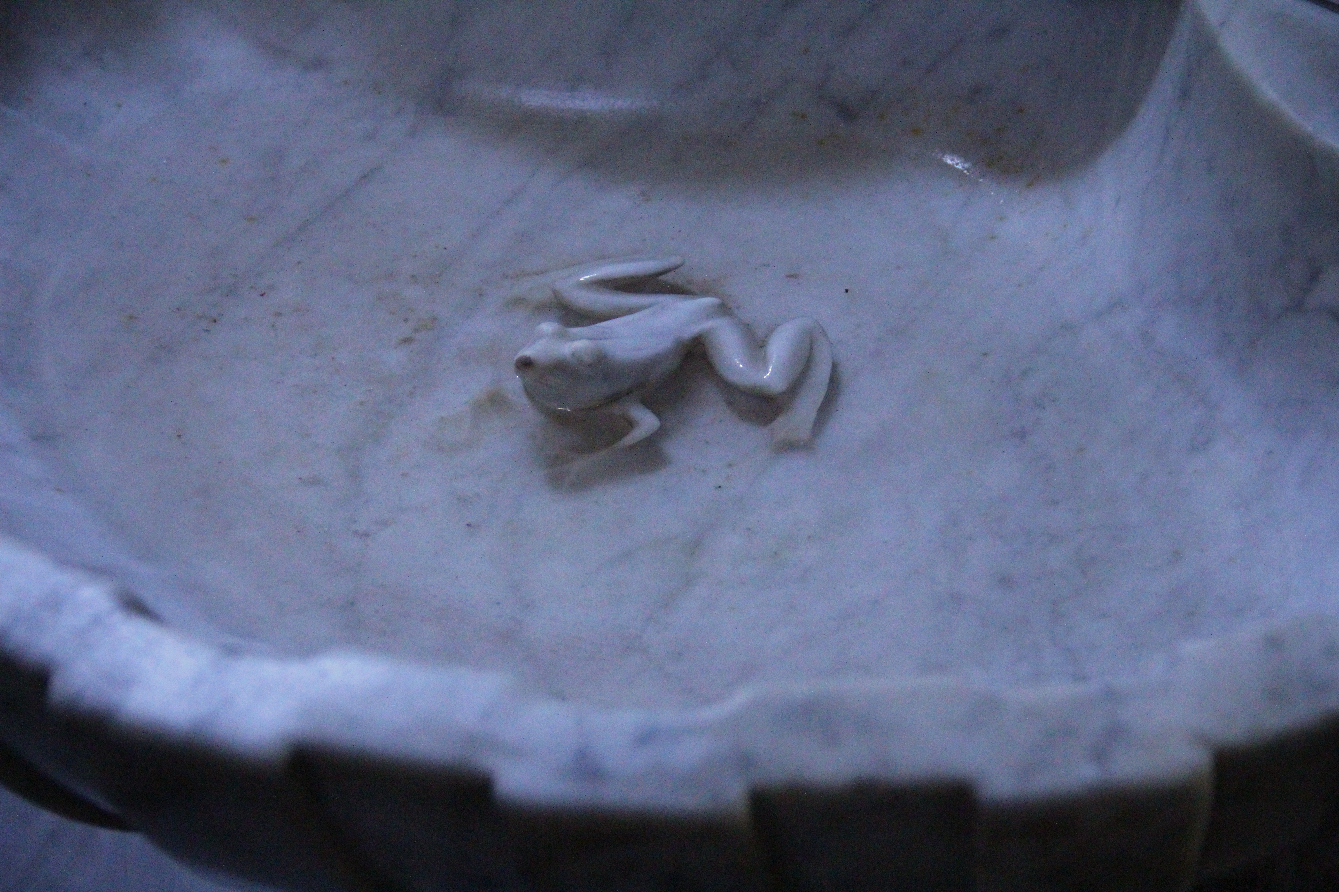 Bénitier sculté avec une grenouille en son centre .